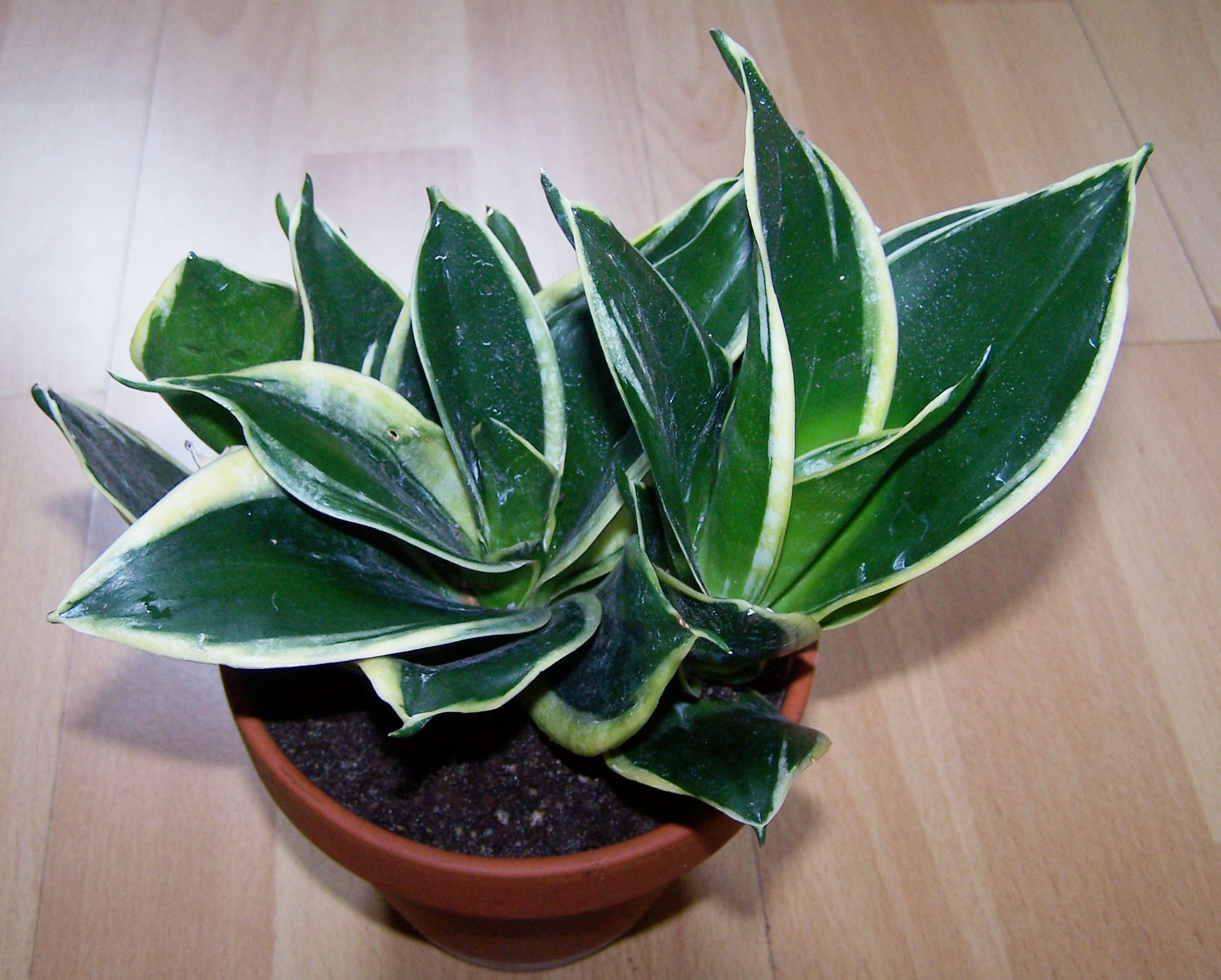 Sansevieria trifasciata "Hahnii Super Marginata" (Kulturform)